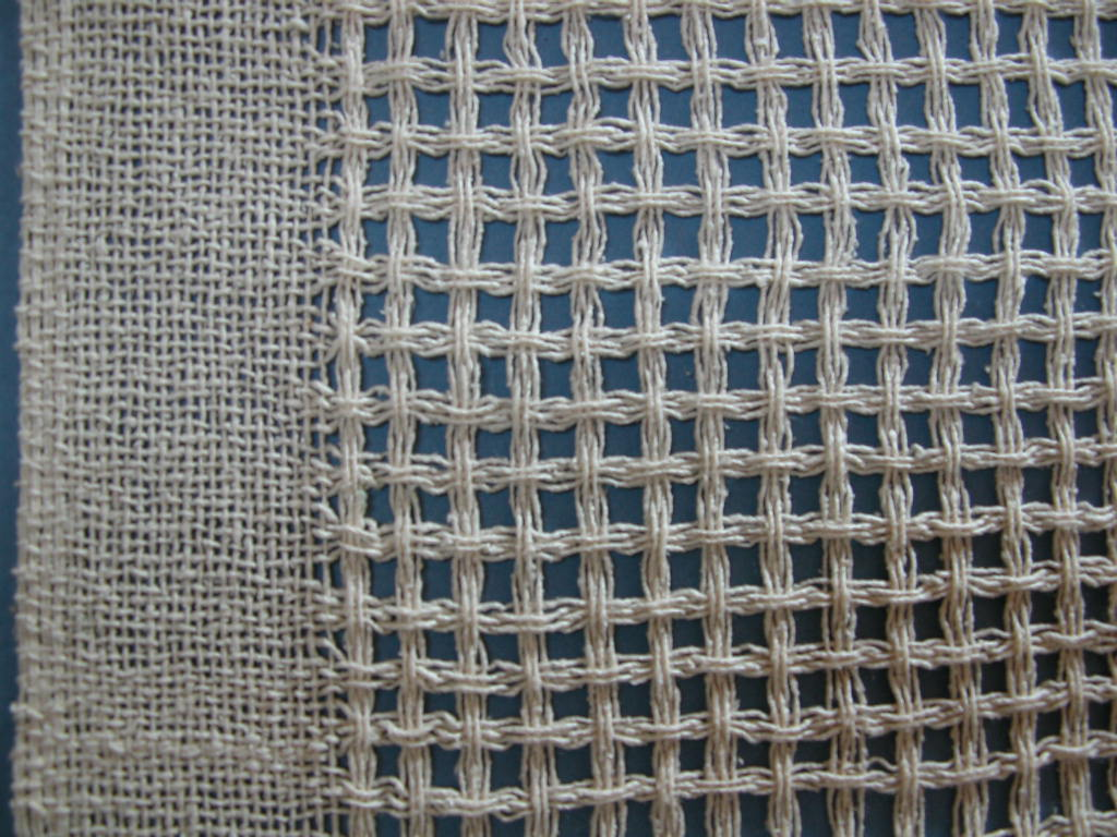 foto mia personale, 2007 Licensing Categoria:Immagini sulla tessitura